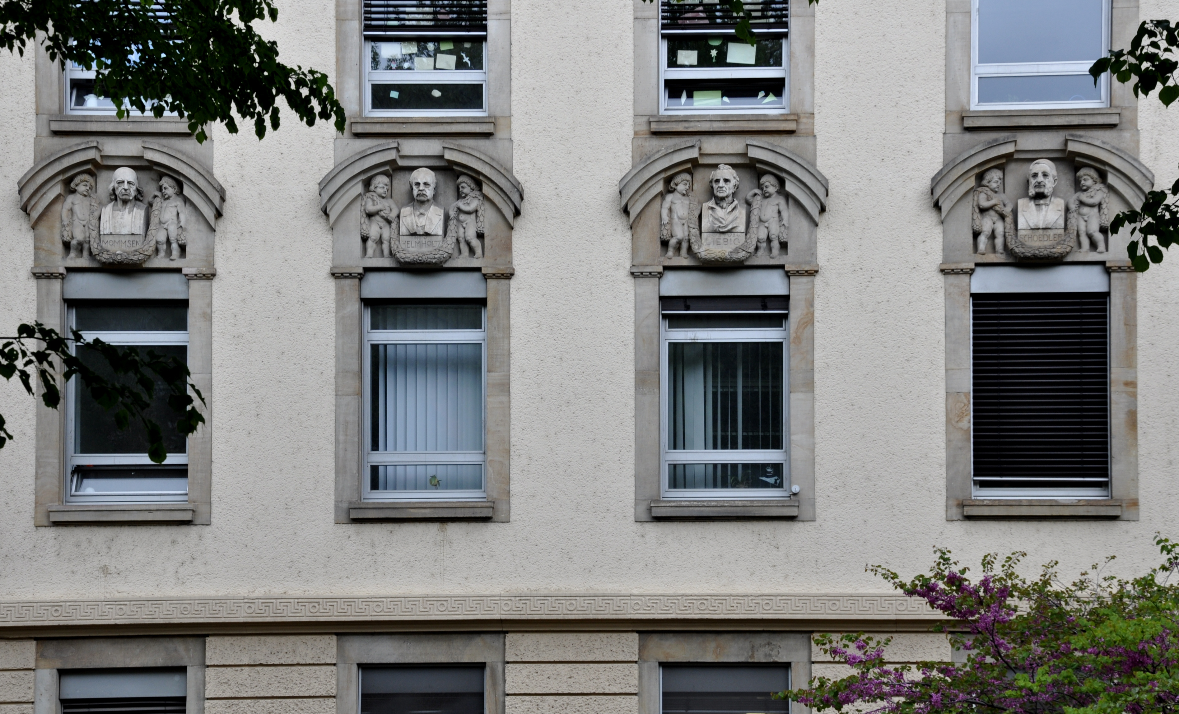 Mainz, Gymnasium am Kurfürstlichen Schloss, Büsten an der Fassade: Theodor Mommsen, Hermann von Helmholtz, Justus Liebig und Schulgründer Friedrich Karl Ludwig Schoedler